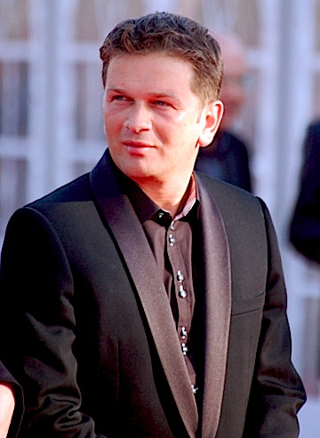 Gaël Morel au festival du film américain de Deauville